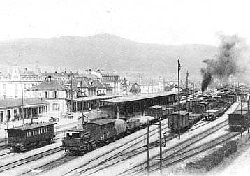 La gare de Delémont en 1897: la Compagnie du Jura-Simplon emploie plusieurs centaines de mécaniciens et chauffeurs de locomotives, de conducteurs de train, d'employés de gare et d'ouvriers de la voie